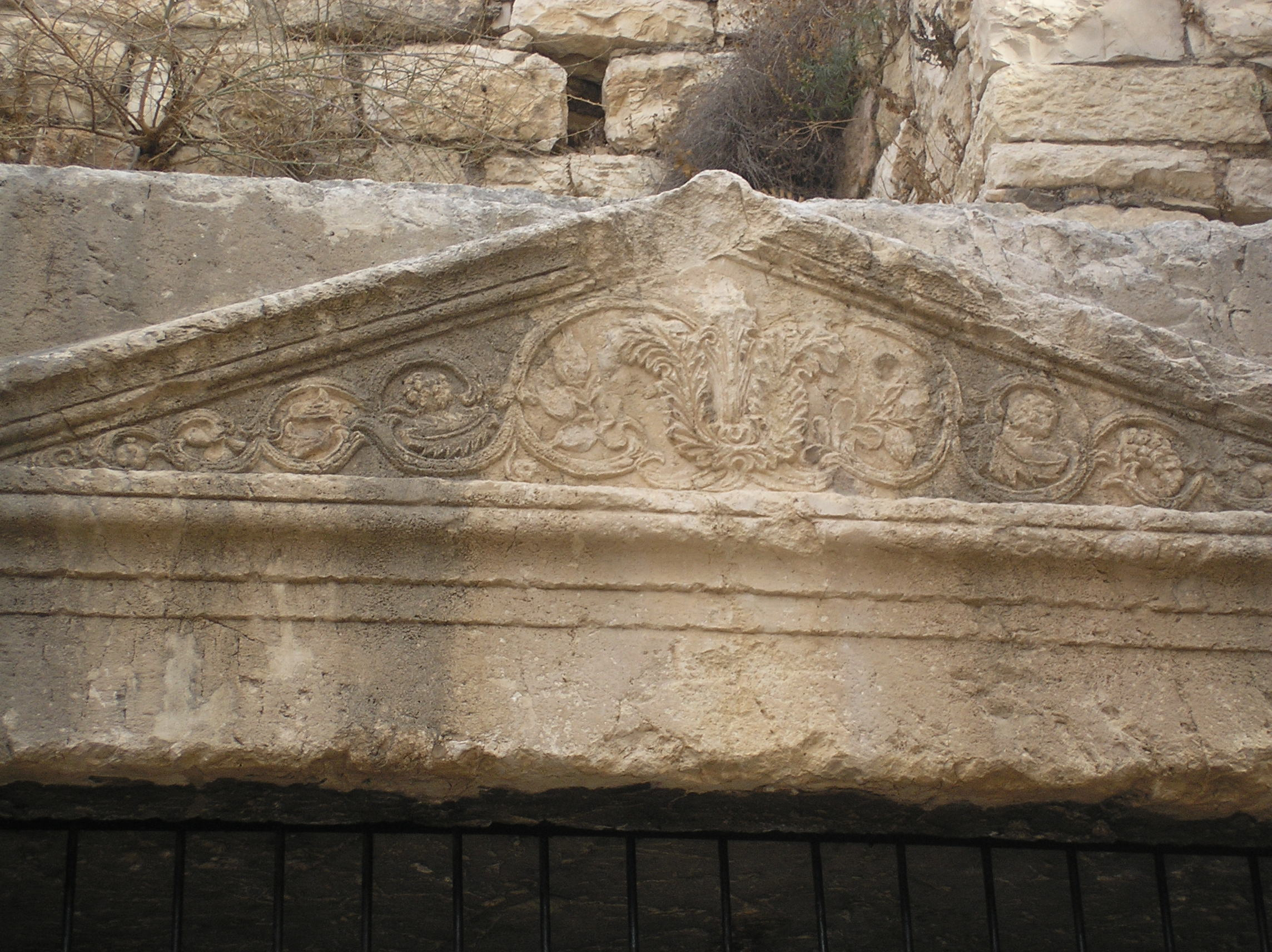 Yad Avshalom